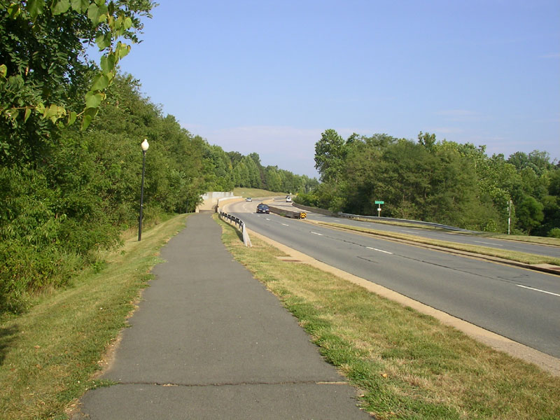 Algonkian Pkwy in Sterling, VA